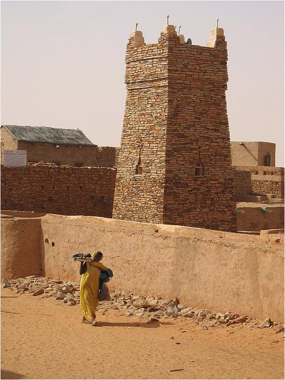 Chinguetti mosque, Mauritania